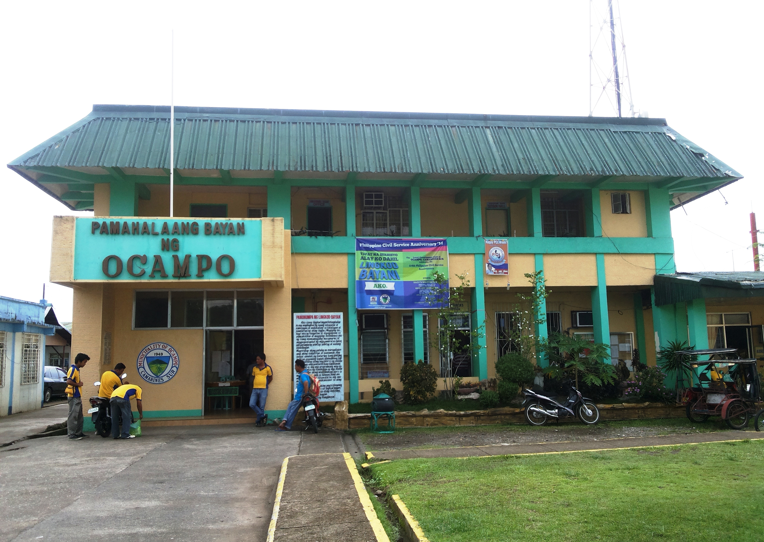 Bikol Central: Munisipyo